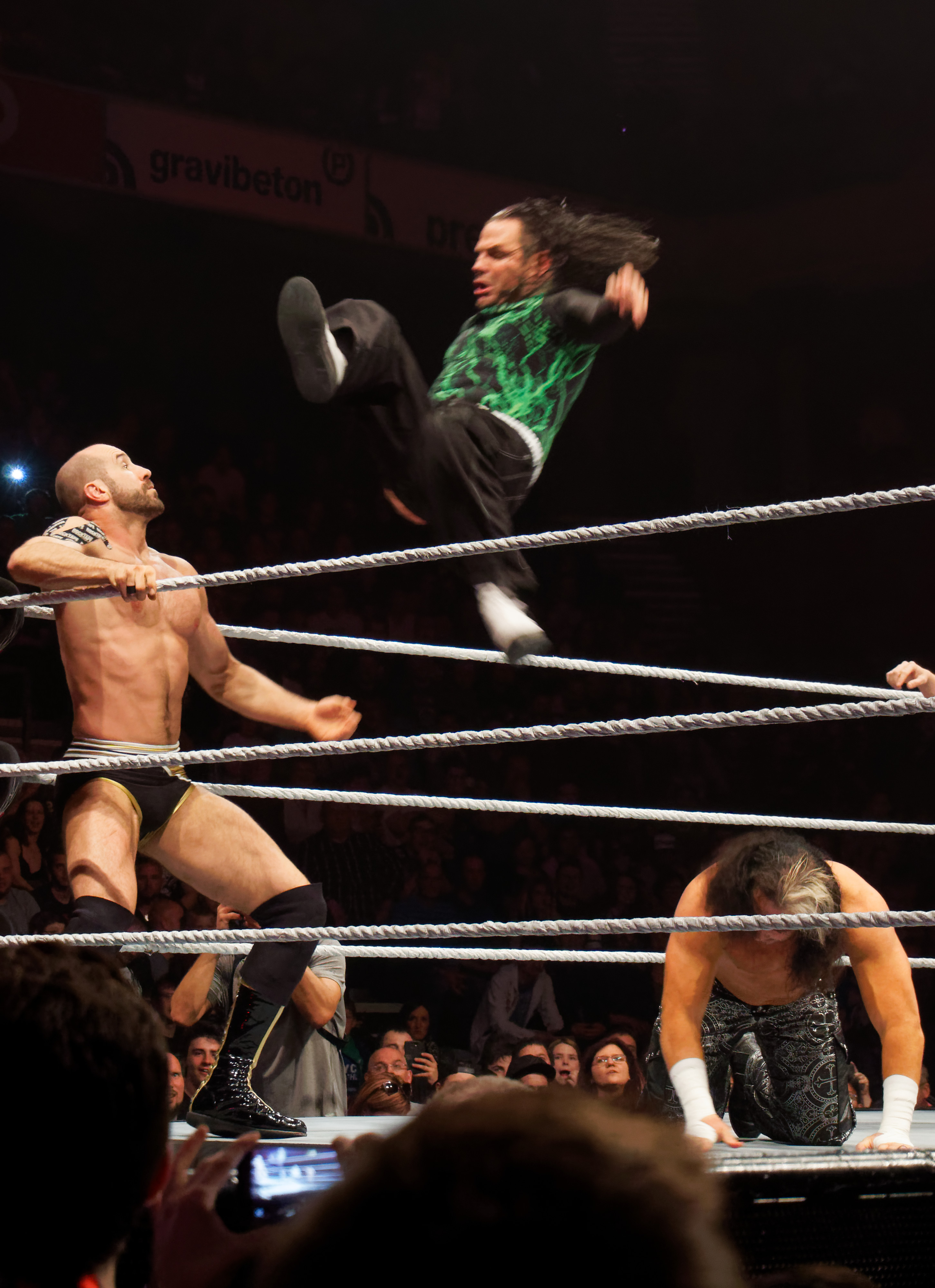 Jeff Hardy (c) & Matt Hardy (c) defeat Big Cass & Enzo Amore, Cesaro & Sheamus (in Triple Threat Match) Info on the match : WWE RAW Tag Team Title ( Le vendredi 12 mai, la WWE Live Tour fera escale au Country Hall a Liege pour le spectacle de catch de l'annee! Au programme: des duels impitoyables et des rencontres captivantes entre les meilleures equipes et les plus grands rivaux. )